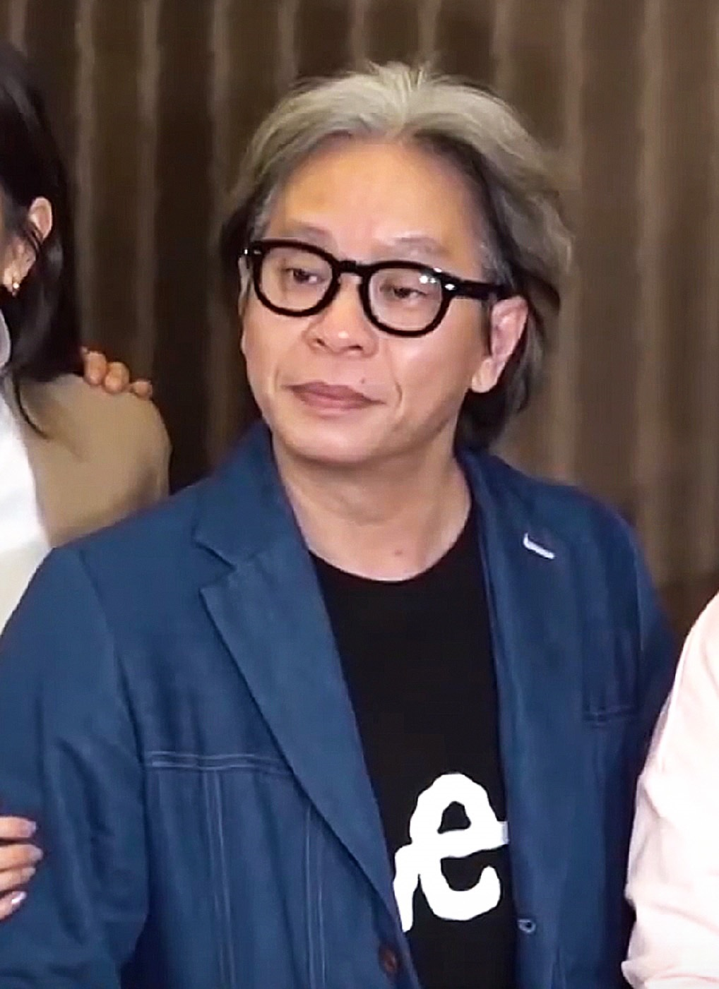 中文（香港）: 【白色強人】視帝馬國明豪氣請慶功：見人少少我請咗先